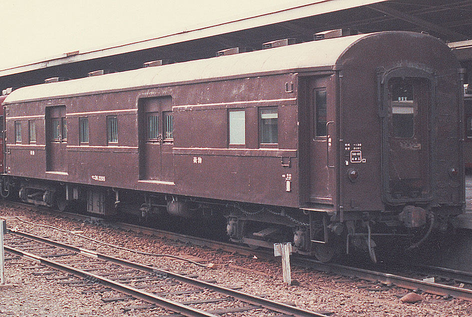 国鉄 マニ36 2205